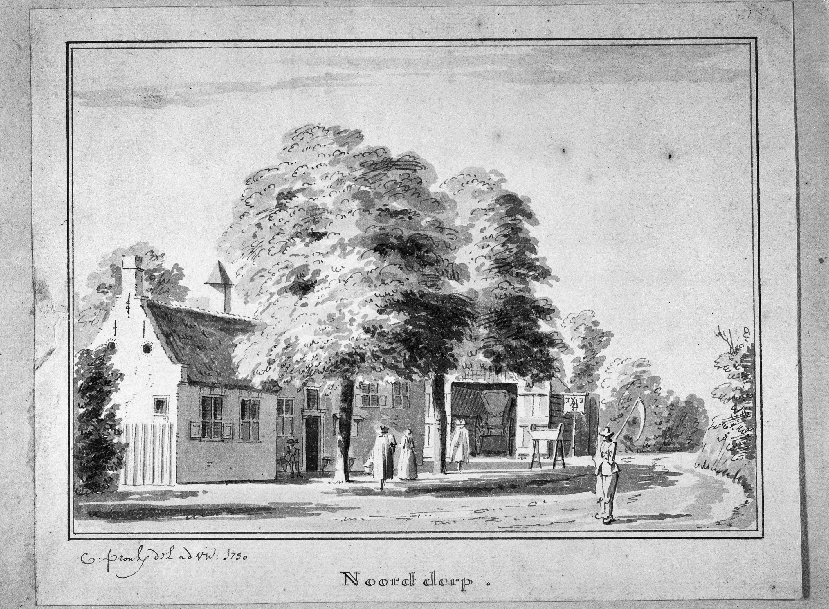 Dorpsgezicht: dorpsgezicht originele tekening door C. Pronk in bezit van Rijksdienst voor de Monumenten Zorg